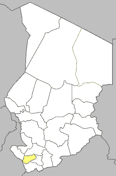 Mappa della diocesi di Moundou, in Ciad.